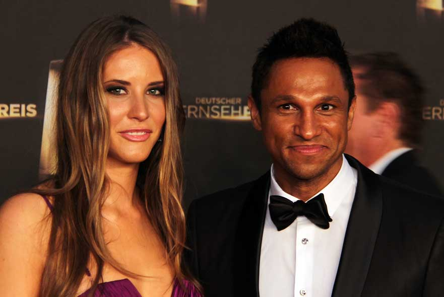 Daniel Aminati mit Begleitung beim Deutschen Fernsehpreis 2012